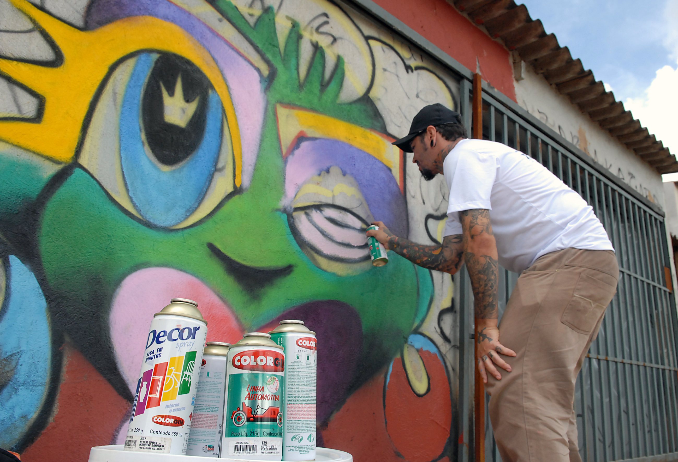 Grafiteiros pintam muros de casas próximas da estação do metrô, em Ceilândia, para chamar a atenção para o projeto de lei que regulamenta o grafite, em tramitação no Congresso Nacional. Cleiton Pessoa, grafiteiro e tatuador de Taguatinga, diz que a arte ajuda a afastar jovens da criminalidade e das drogas.